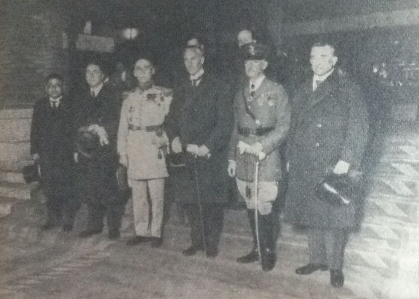 1932年の訪日時のリットン調査団。左から、シュネー、マッコイ (Frank Ross McCoy)、リットン、クローデル (General Henri Claudel)、マレスコッティ (Luigi Aldrovandi Marescotti, Conte di Viano)